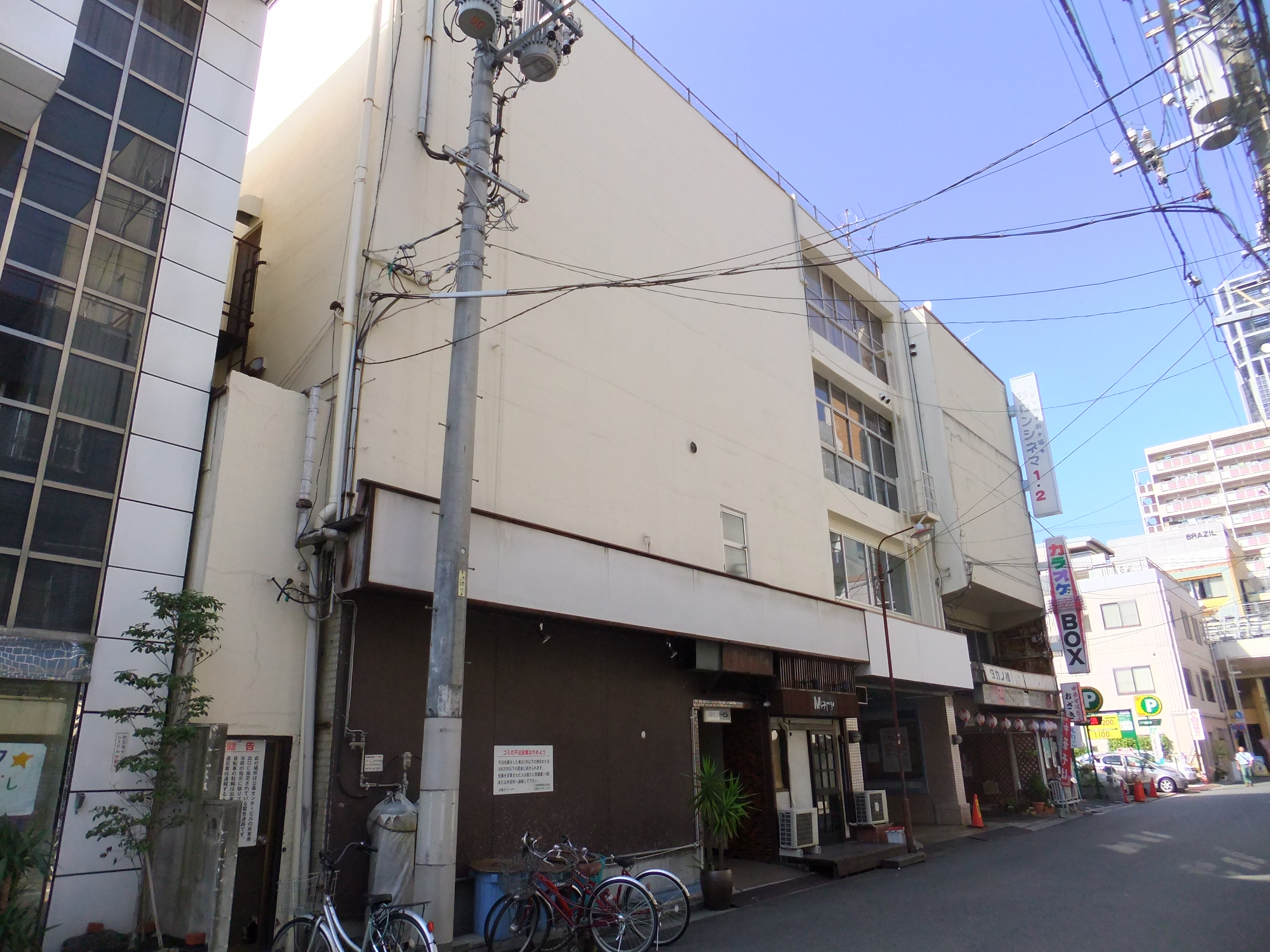 広島市の映画館、サロンシネマ。2014年に八丁堀に移転する前の鷹野橋時代。